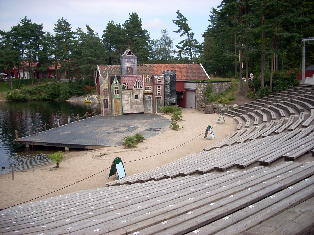 Amfiteateret til Kaptein Sabeltann